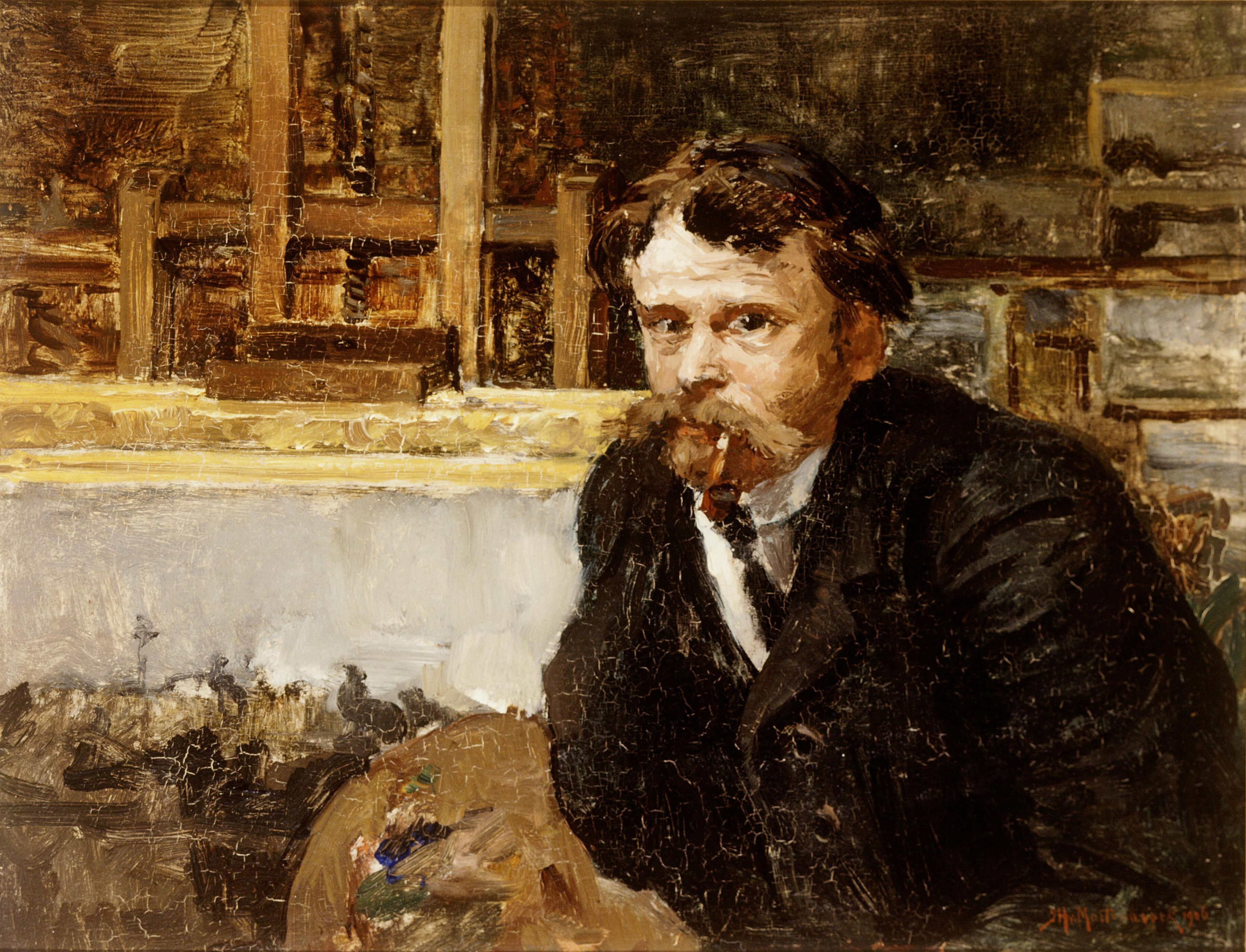 Zelfportret van Johan Hendrik van Mastenbroek (1875-1945) uit 1906